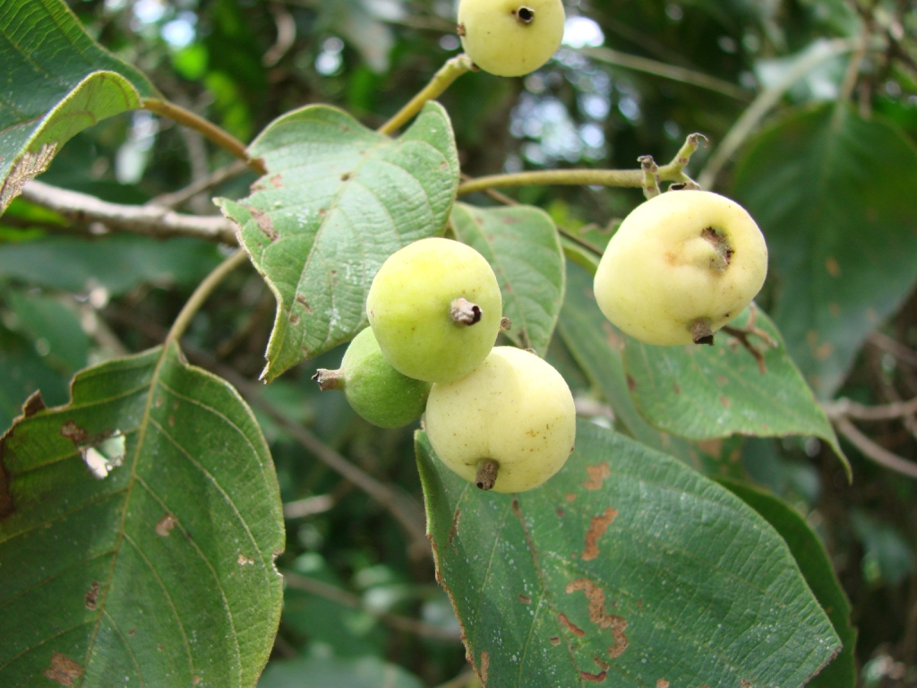 Guettarda viburnoides - RUBIACEAE Parque Nacional de Brasilia - Distrito Federal - Brasil.